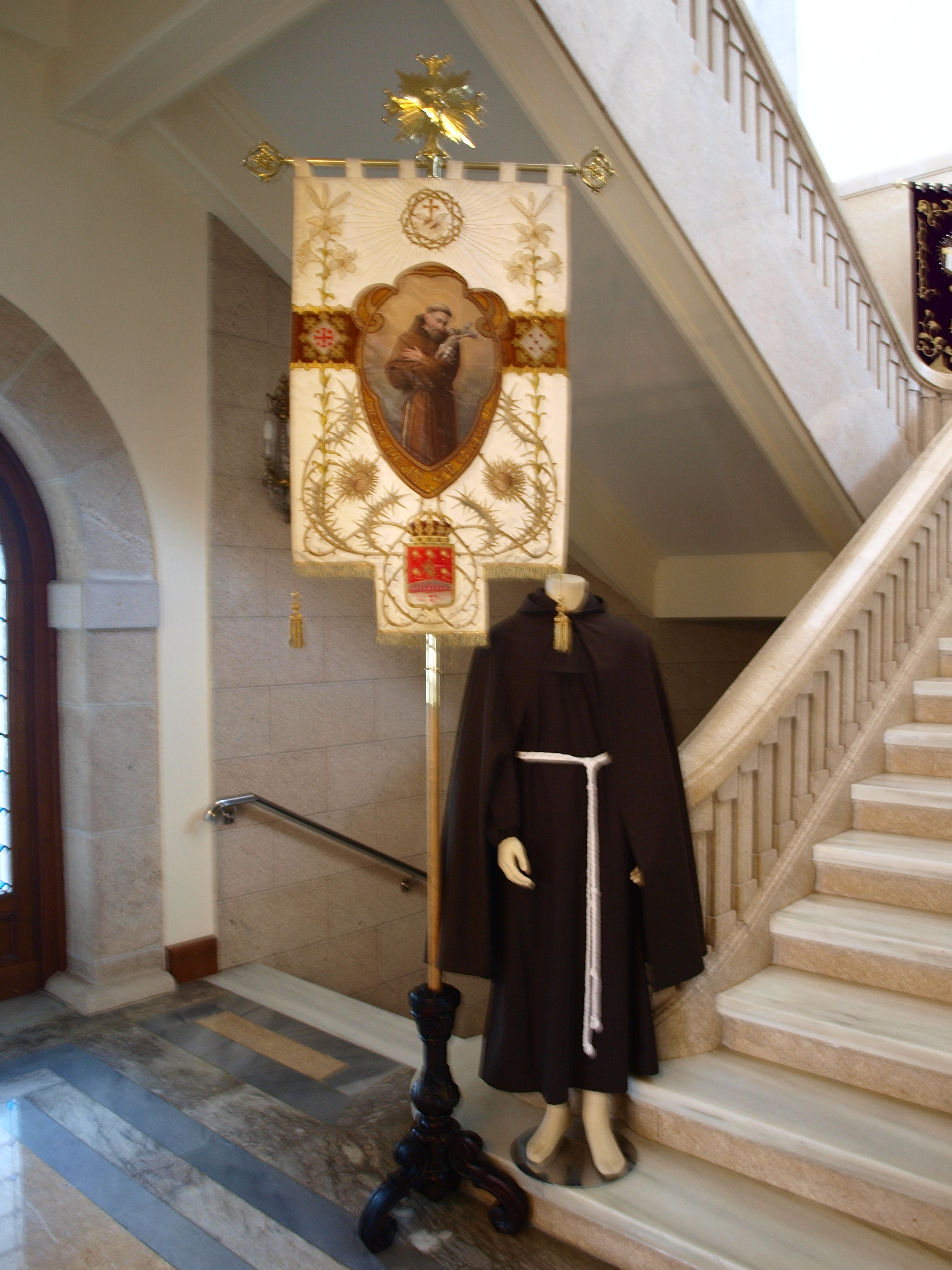 Vestimentas y estandarte de la VOTF